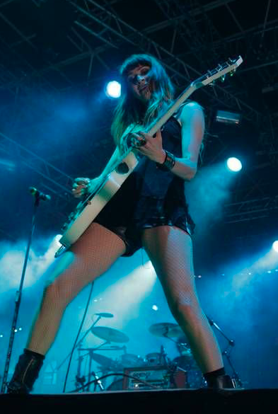 Ha*Ash en Zacatecas durante su gira "A Tiempo"